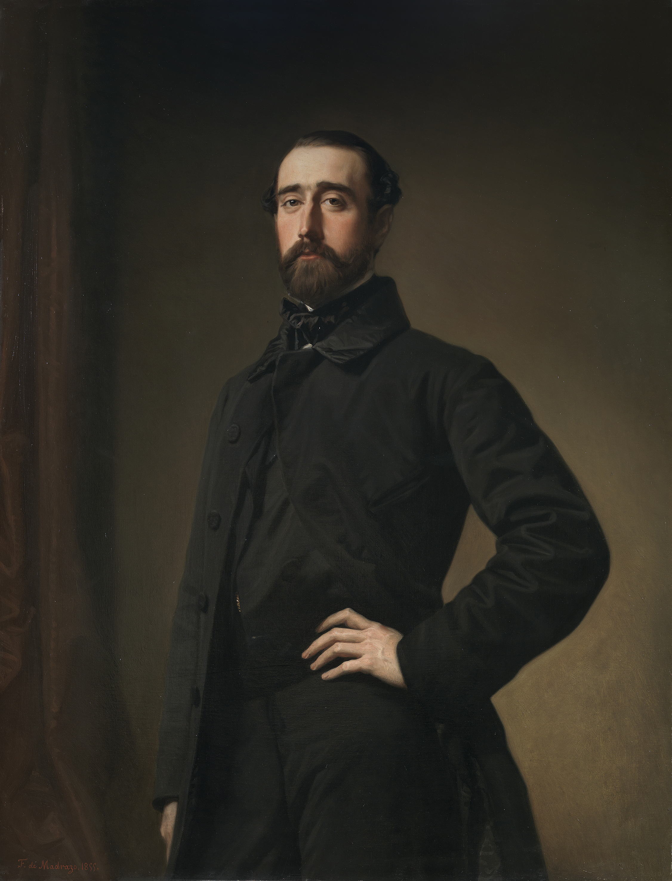 Retrato del politico español Segismundo Moret (1833-1913).